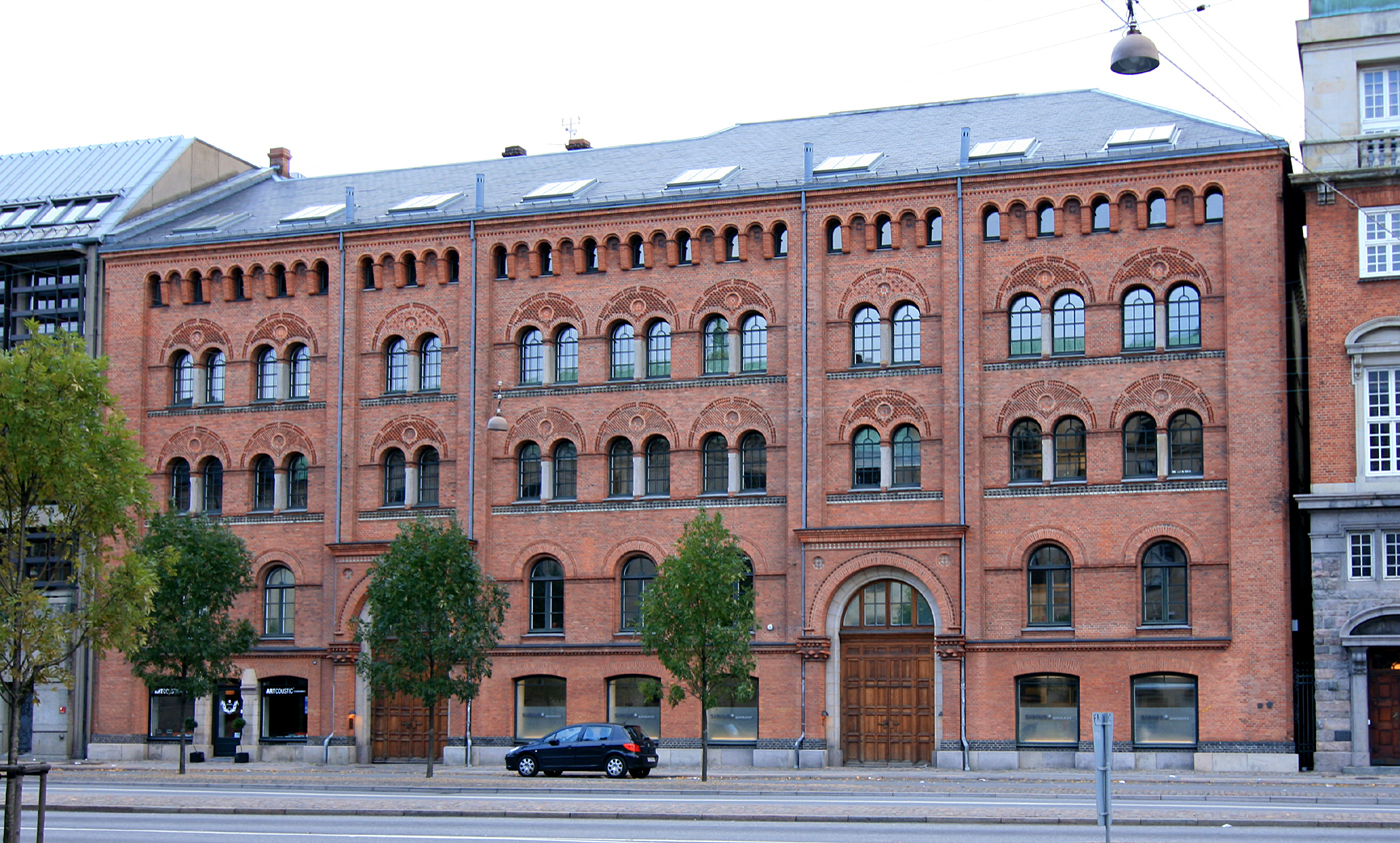 Grøns Pakhus, Holmens Kanal 7, København. Bygget 1860-1862. Arkitekt: Johan Daniel Herholdt. Fredet.